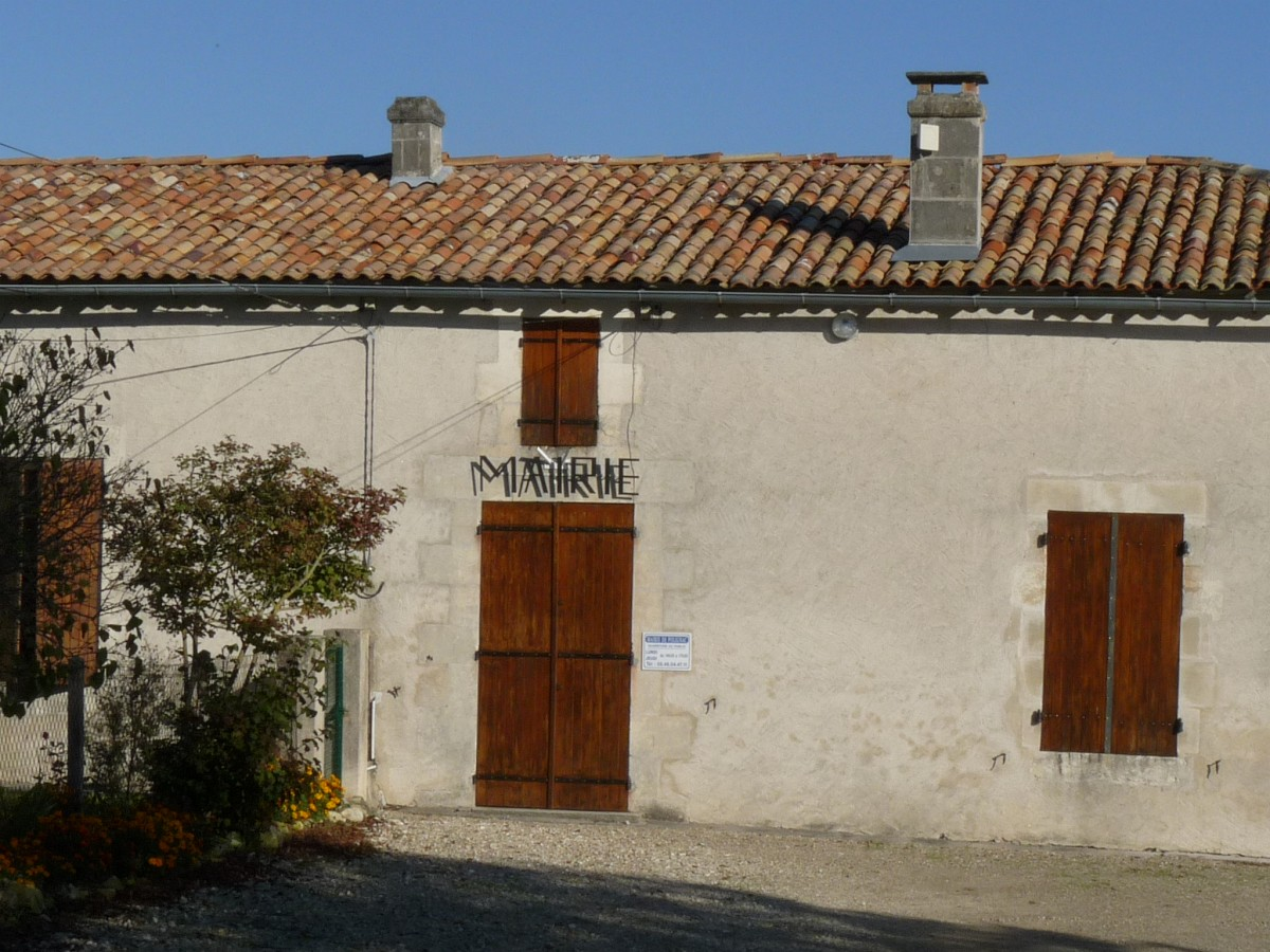 Mairie de Polignac, Charente-Maritime, France